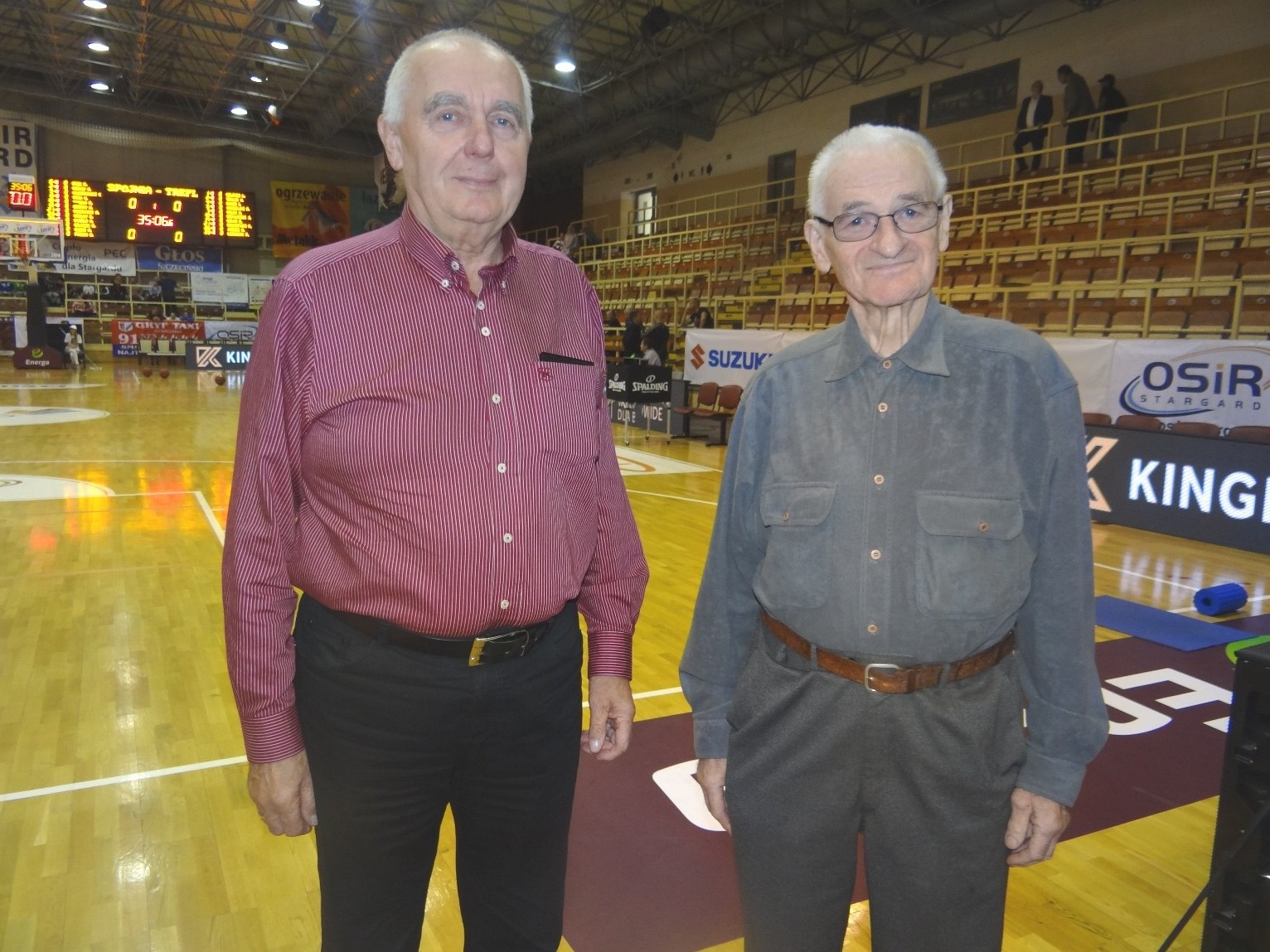 Działacze szczecińscy, 14.10.2015